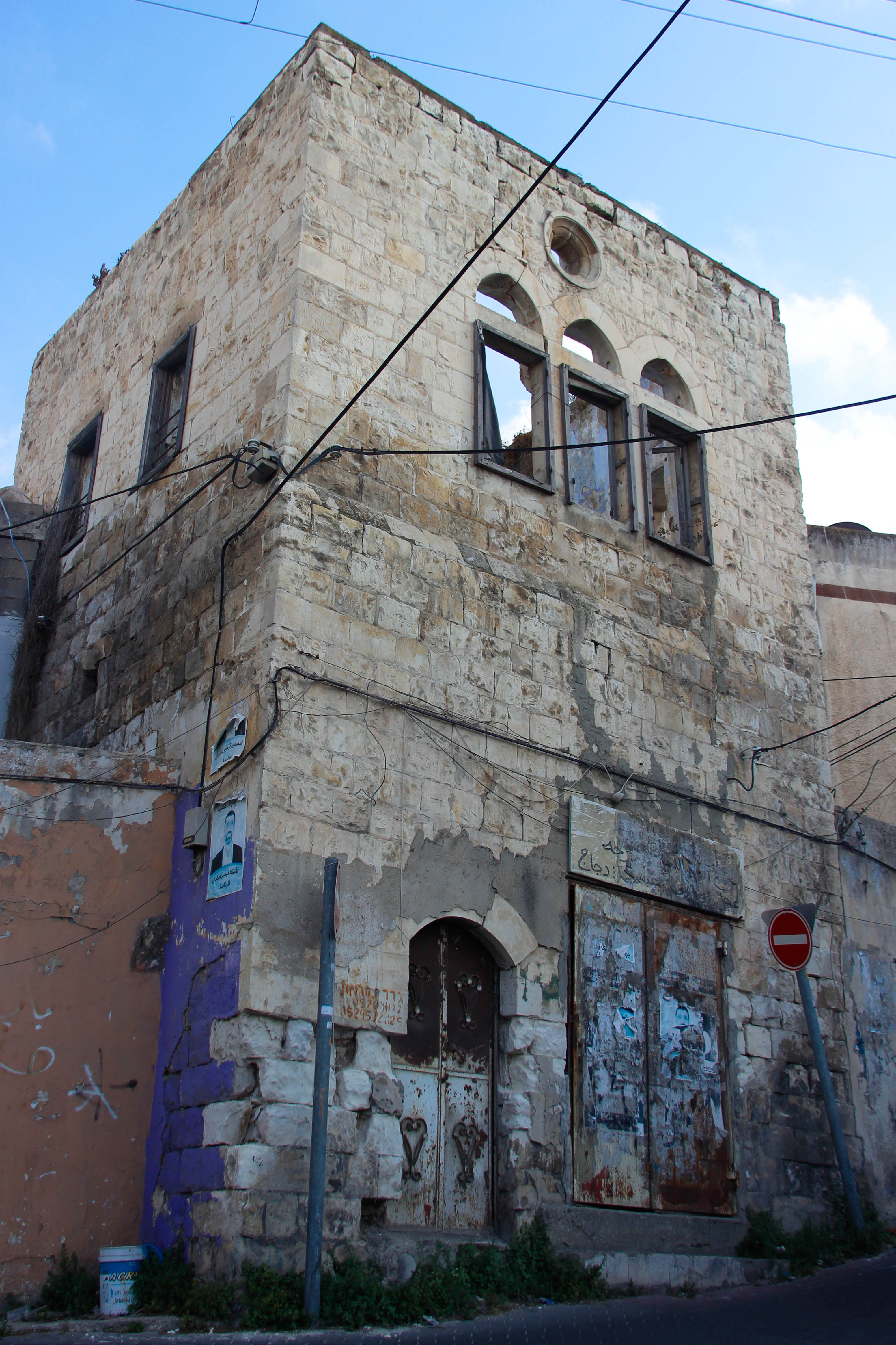 مبنى قديم في مدينة أم الفحم.